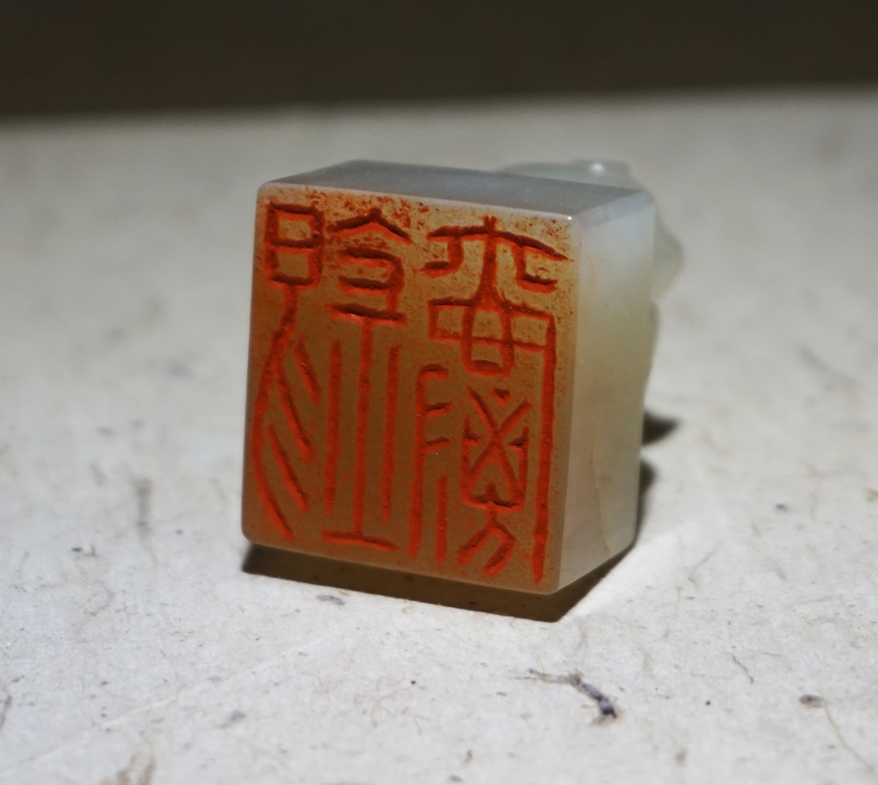 “锡爵”玉印。和田玉，螭虎钮，阴文。苏州王锡爵墓出土，苏州博物馆藏。